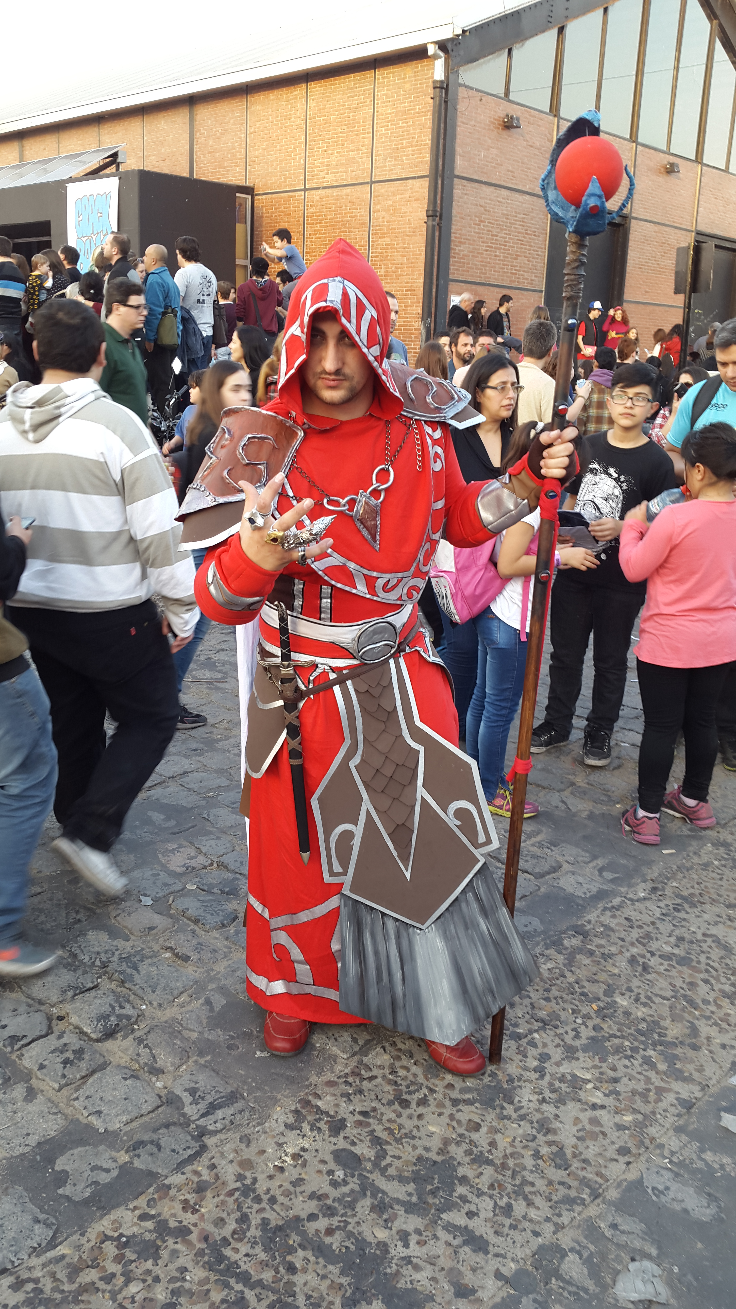 Mago